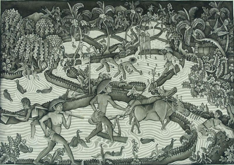 Schildering. Een aantal mensen bewerkt het rijstveld met hakken (pacul), terwijl anderen karbouwen voortdrijven met een soort ploeg. Weer anderen zijn bezig om de jonge rijstplantjes (bibit) uit te zetten. Onder een stok met witte vlag bevinden zich eenden. De karbouwen hebben een korfje om de bek om te voorkomen dat ze van het rijstveld eten. Op de achterkant staat de naam van de schilder en de plaats van herkomst: Batoean Gianjar (Batuan Gianyar). Verder is een potloodtekening van dezelfde ploeg te zien als die aan de voorkant.. Het bewerken van de sawa